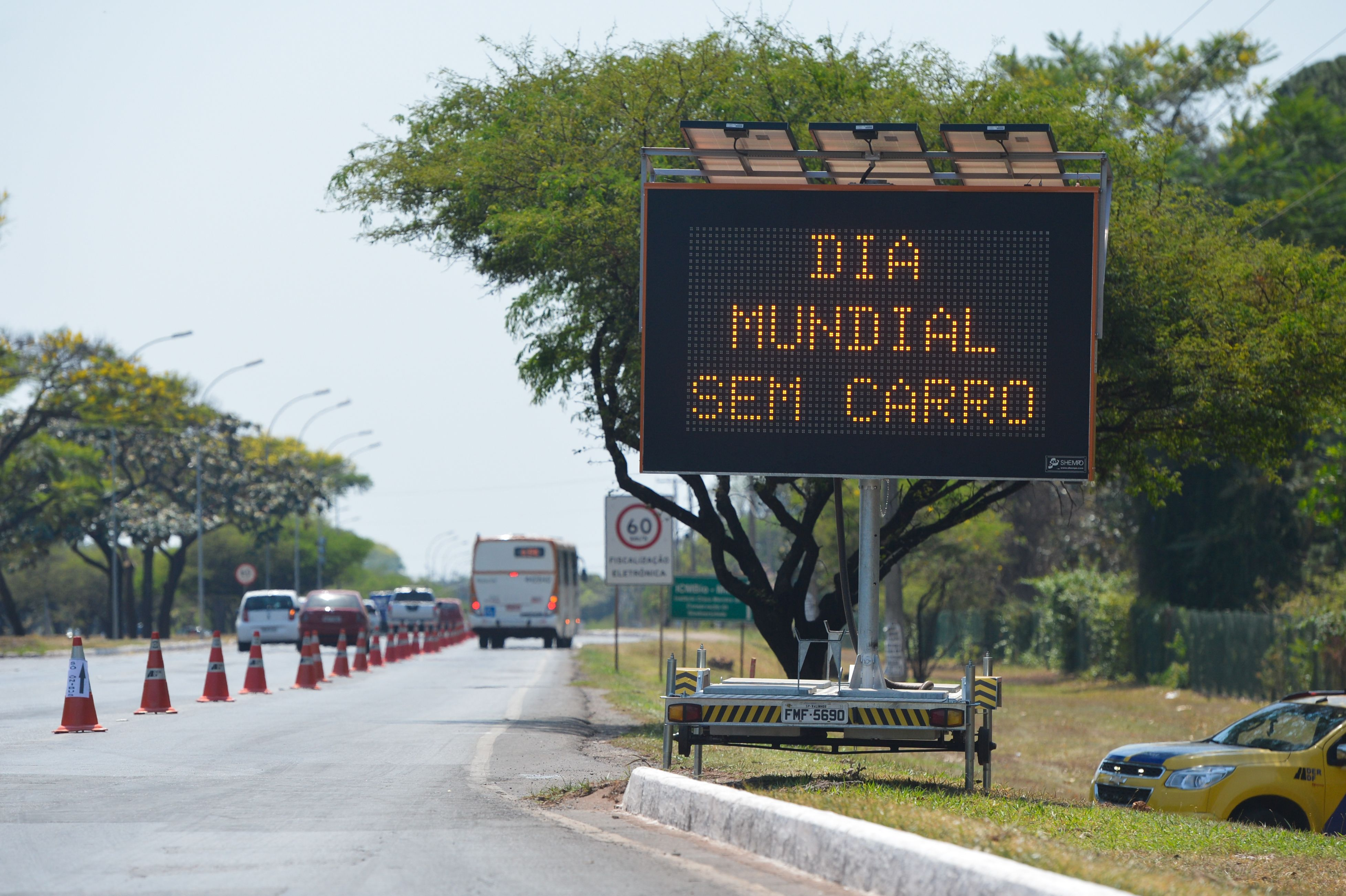 Dia Mundial Sem Carro de 2015 em Brasília